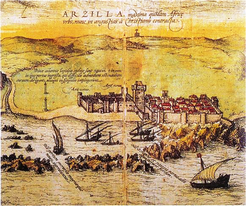 Arzila. in Civitates Orbis Terrarum. Hogenberg & Braun, c. 1570. Biblioteca Nacional de Portugal.